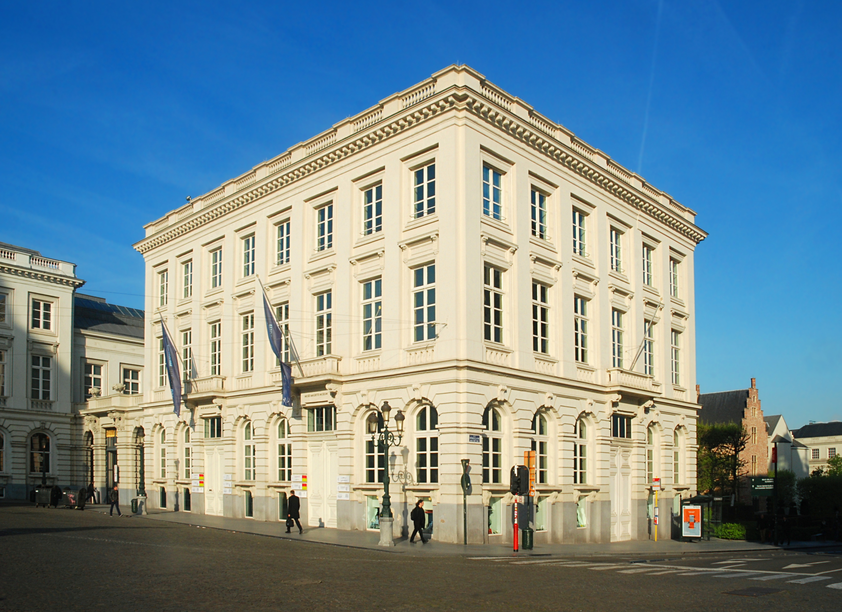 Belgique - Bruxelles - Place Royale - Hôtel du Lotto